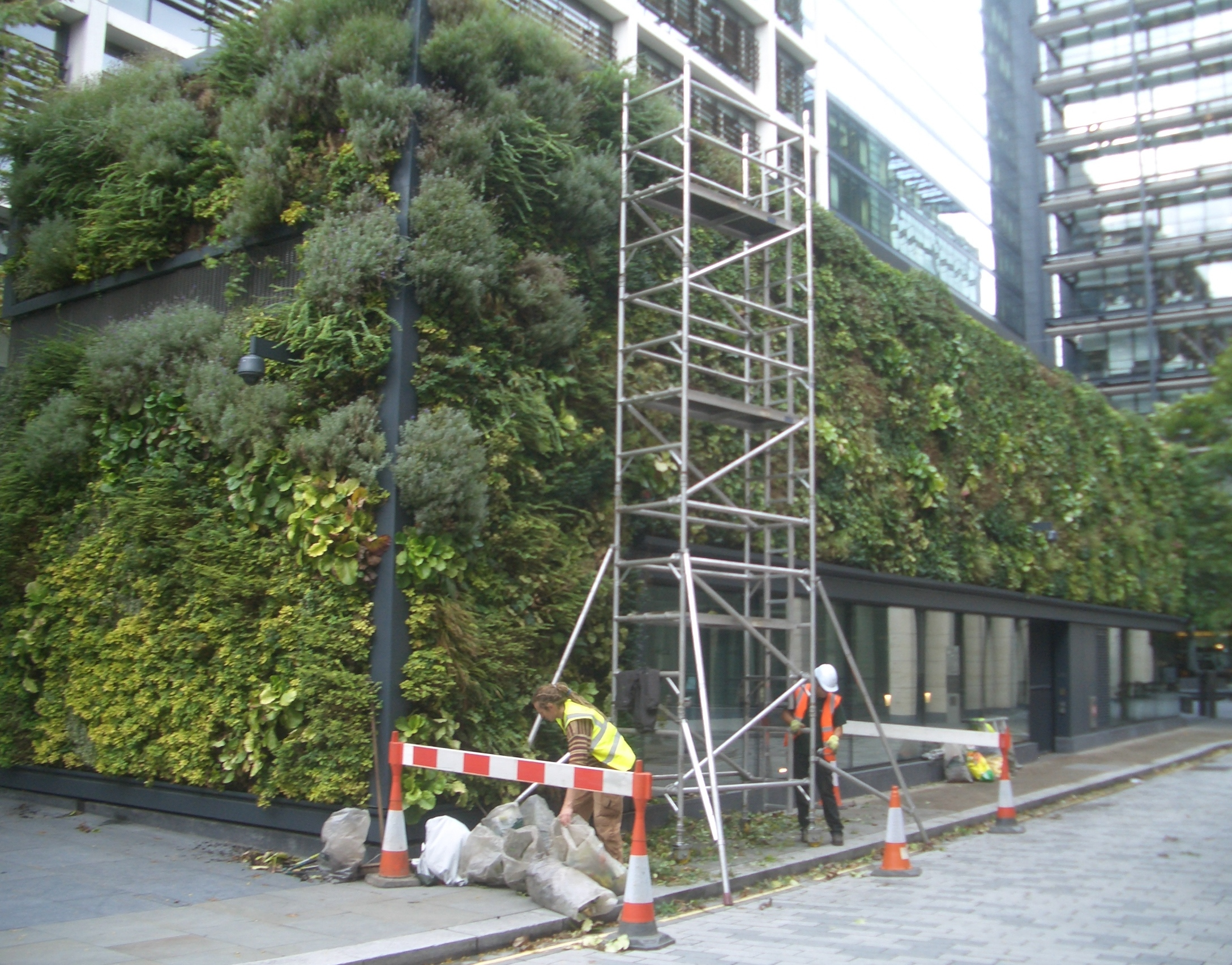 Grüne Wand, City of London 2013